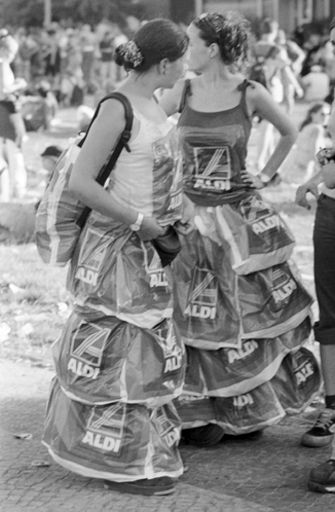 Konsumkritiker in Berlin